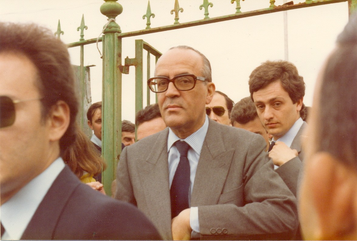 El Excmo. Sr. Don Leopoldo Calvo-Sotelo de visita a El Puerto de Santa María entrando en el Muelle San Ignacio donde atraca el celebre vapor "Adriano III"